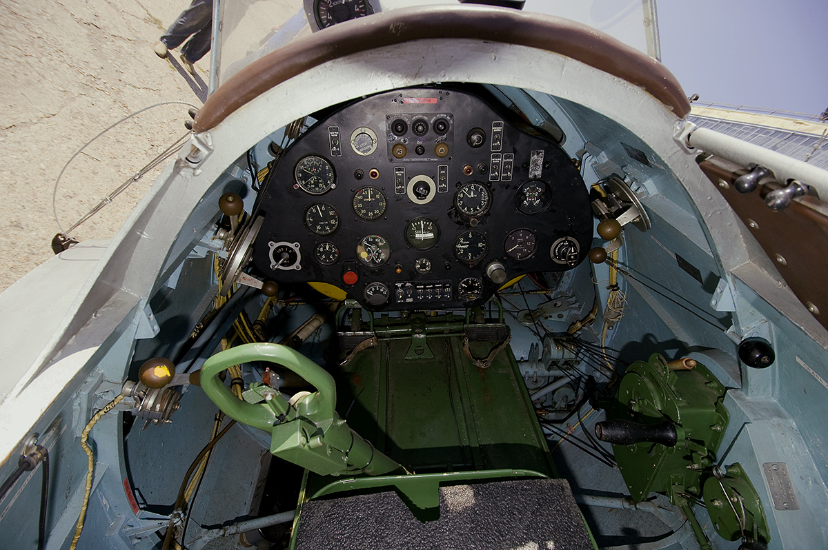 I-16 (34) cockpit